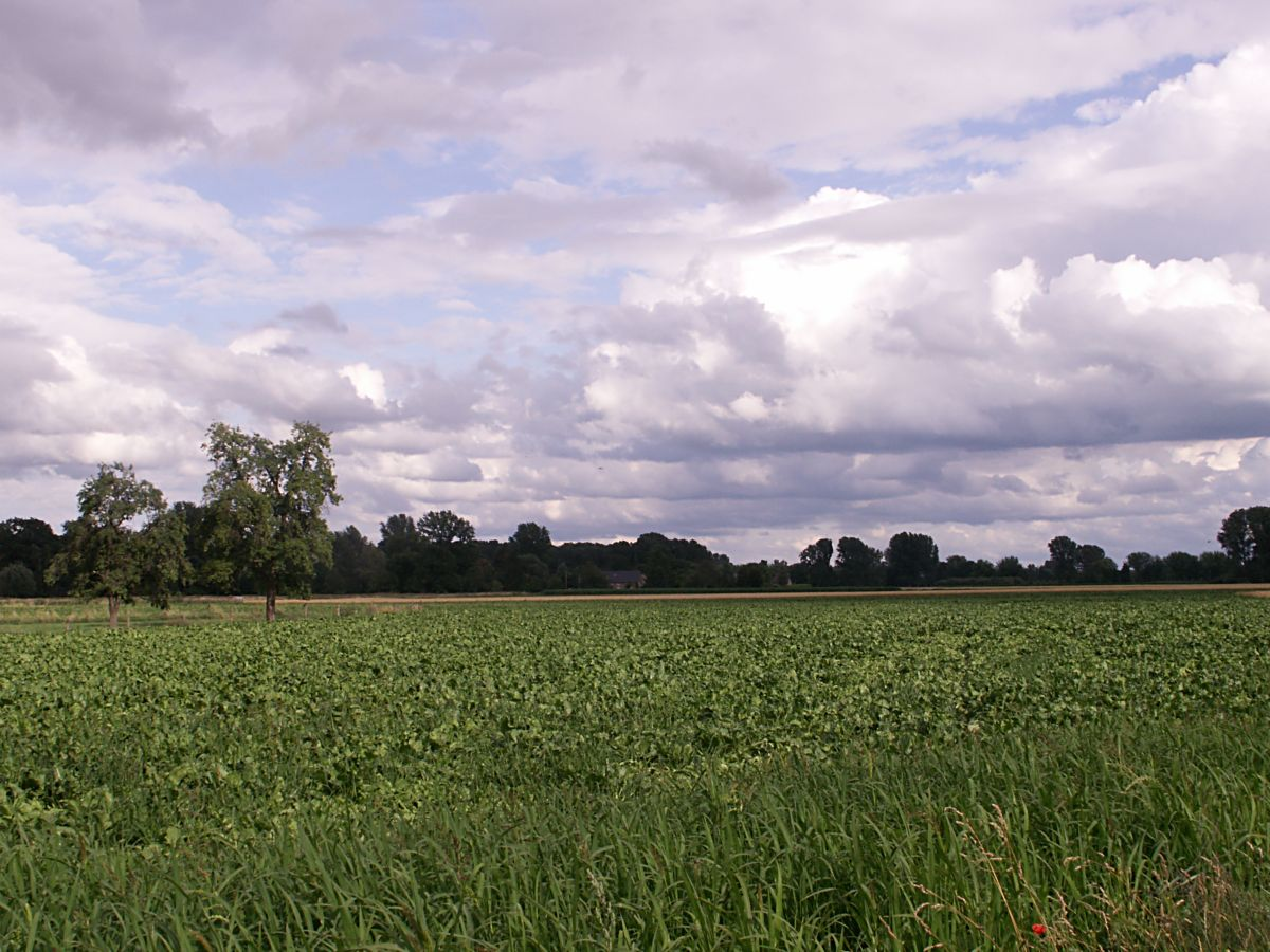 Landschafts-Motive aus dem Heinsberger Land